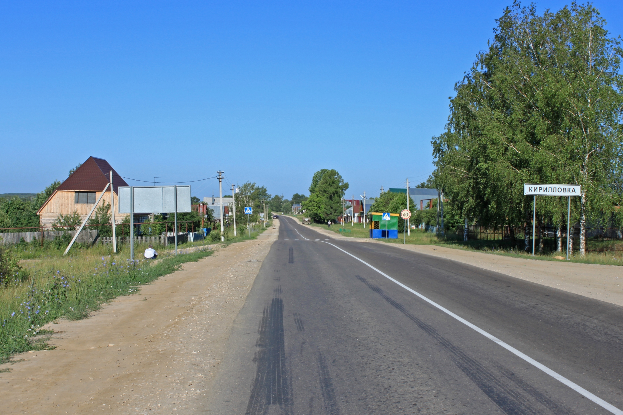 Кирилловка Арзамасский район Въезд в село